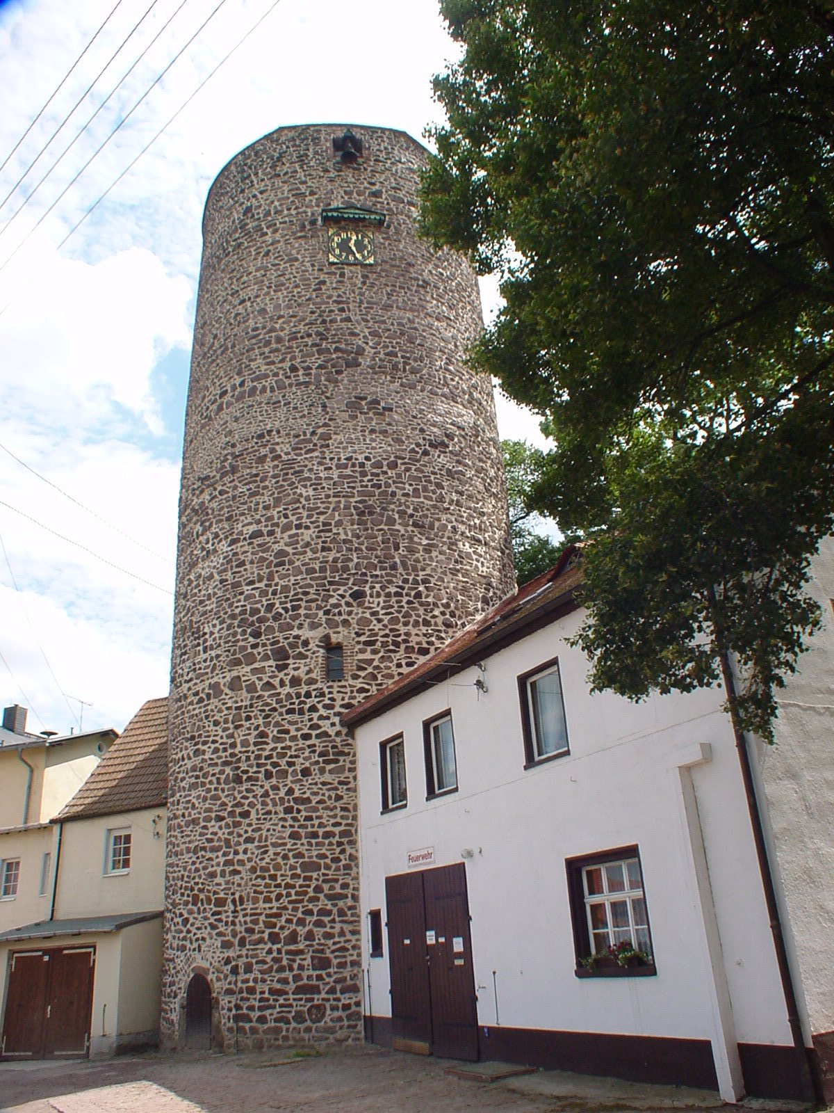 Burg Krosigk eigenes Foto von 2003, public domain. Mewes 07:08, 8. Jan 2005 (CET) Bergfried